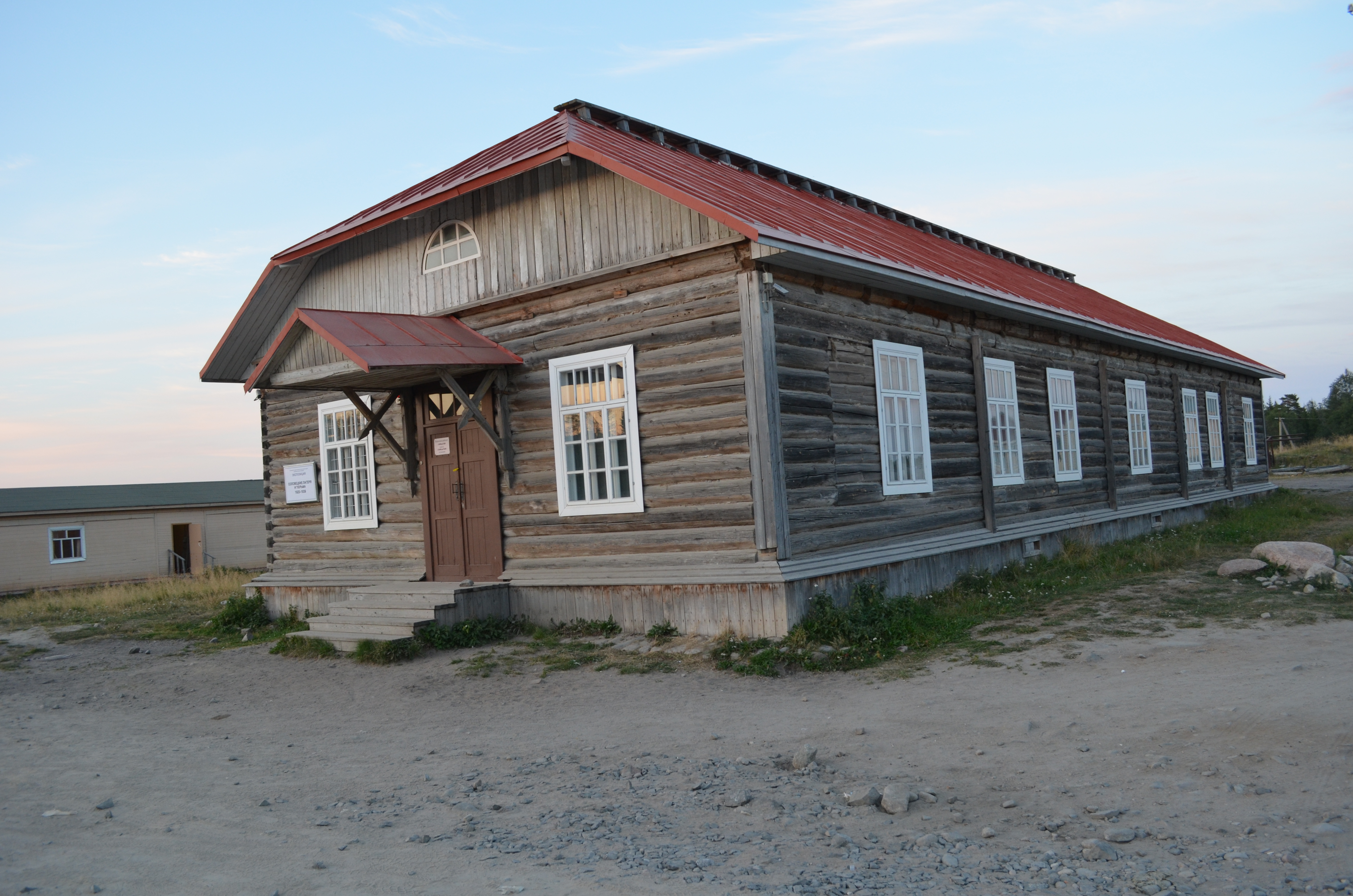 Барак-музей на Соловках